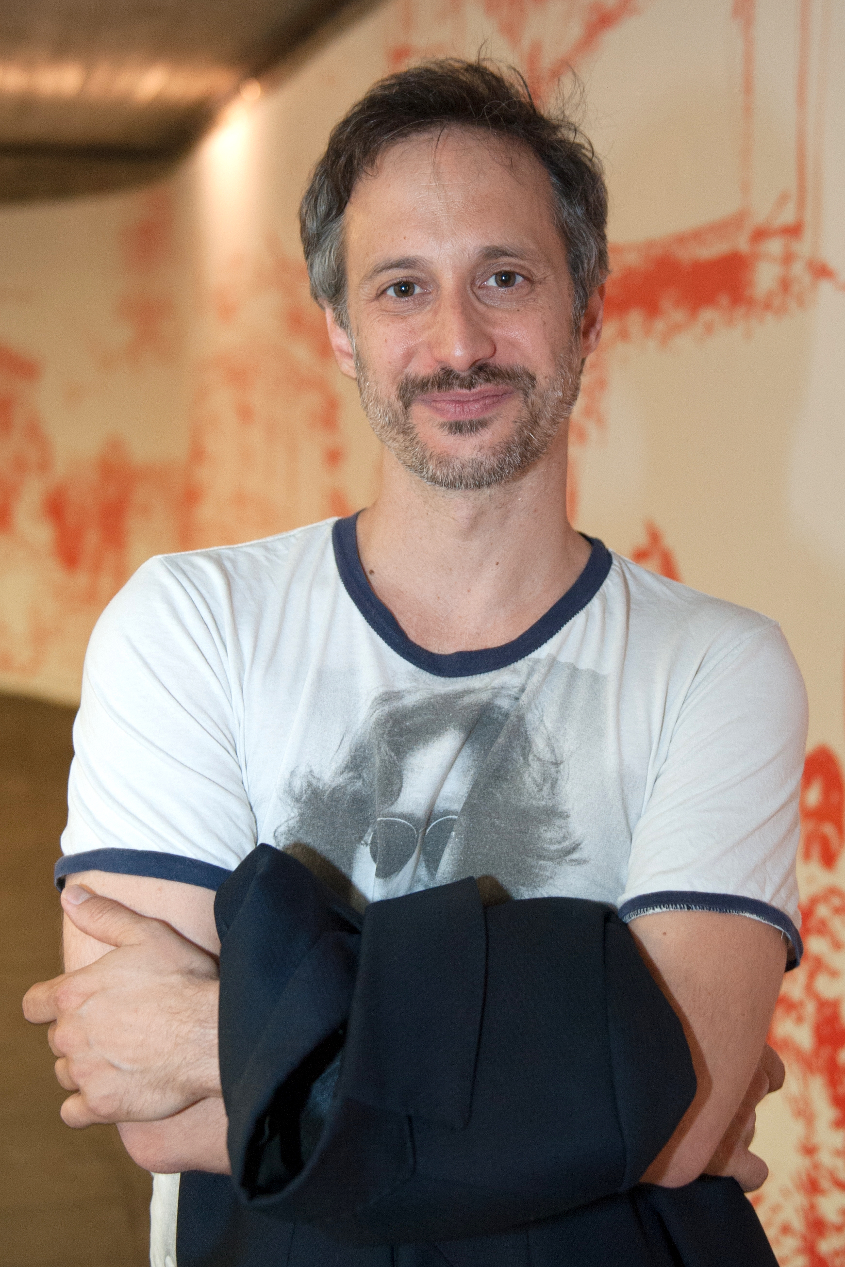 Vienna Independent Shorts: Michael Ostrowski